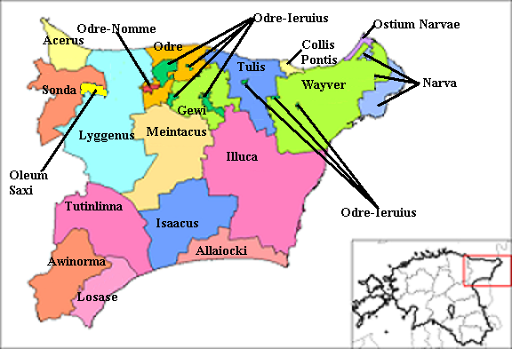 Vironiae Orientalis municipia Latine